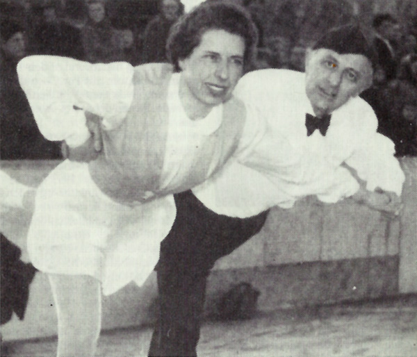 Eva og Harry Meistrup, danmarksmestre i parløb, kunstskøjteløb 1948